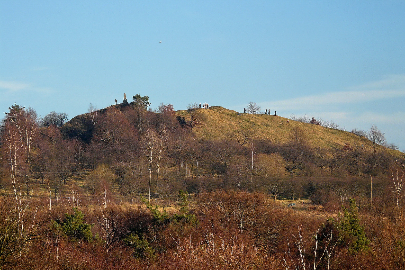 Vrch Mužský z okraje skalní plošiny